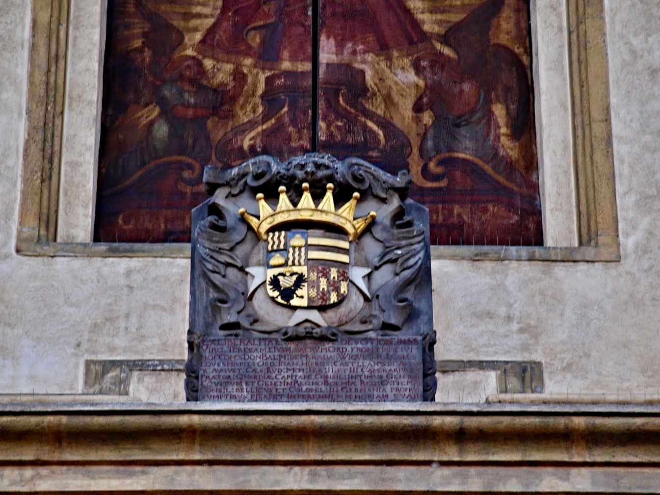 Kostel Panny Marie Vítězné a sv. Antonína Paduánského na Malé Straně v Praze